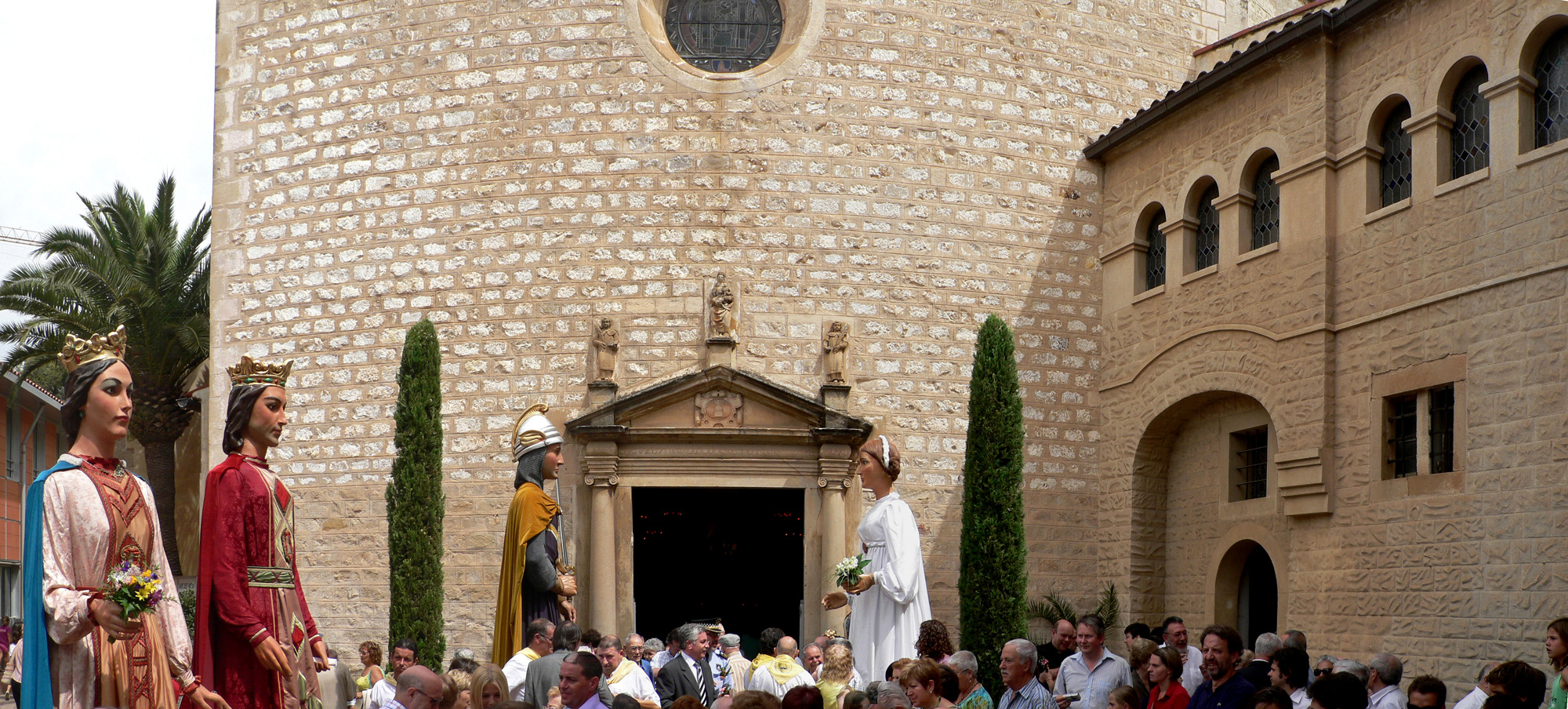 Sant Just Desvern (Comtat de Barcelona). Plaça de l'Església. Diada dels Sants Just i Pastor de 2007